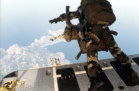 Largage du chuteurs opérationnels du 2e REP au-dessus de la Balagne